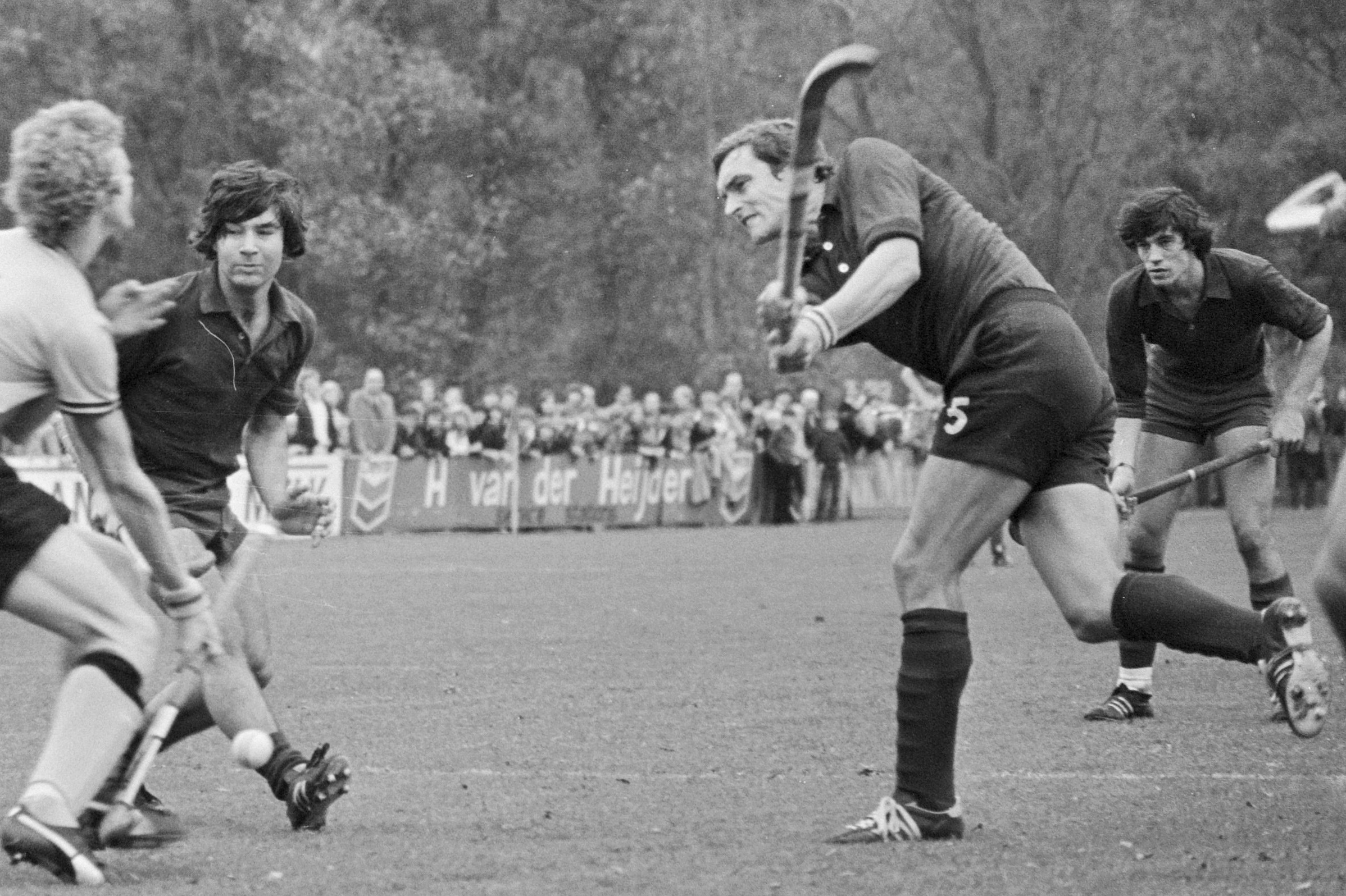 Hockey HGC tegen HCKZ; Edo Buma (HCKZ) lost schot op HGC-doel, terwijl de gebroeders Steens (HCKZ) toekijken